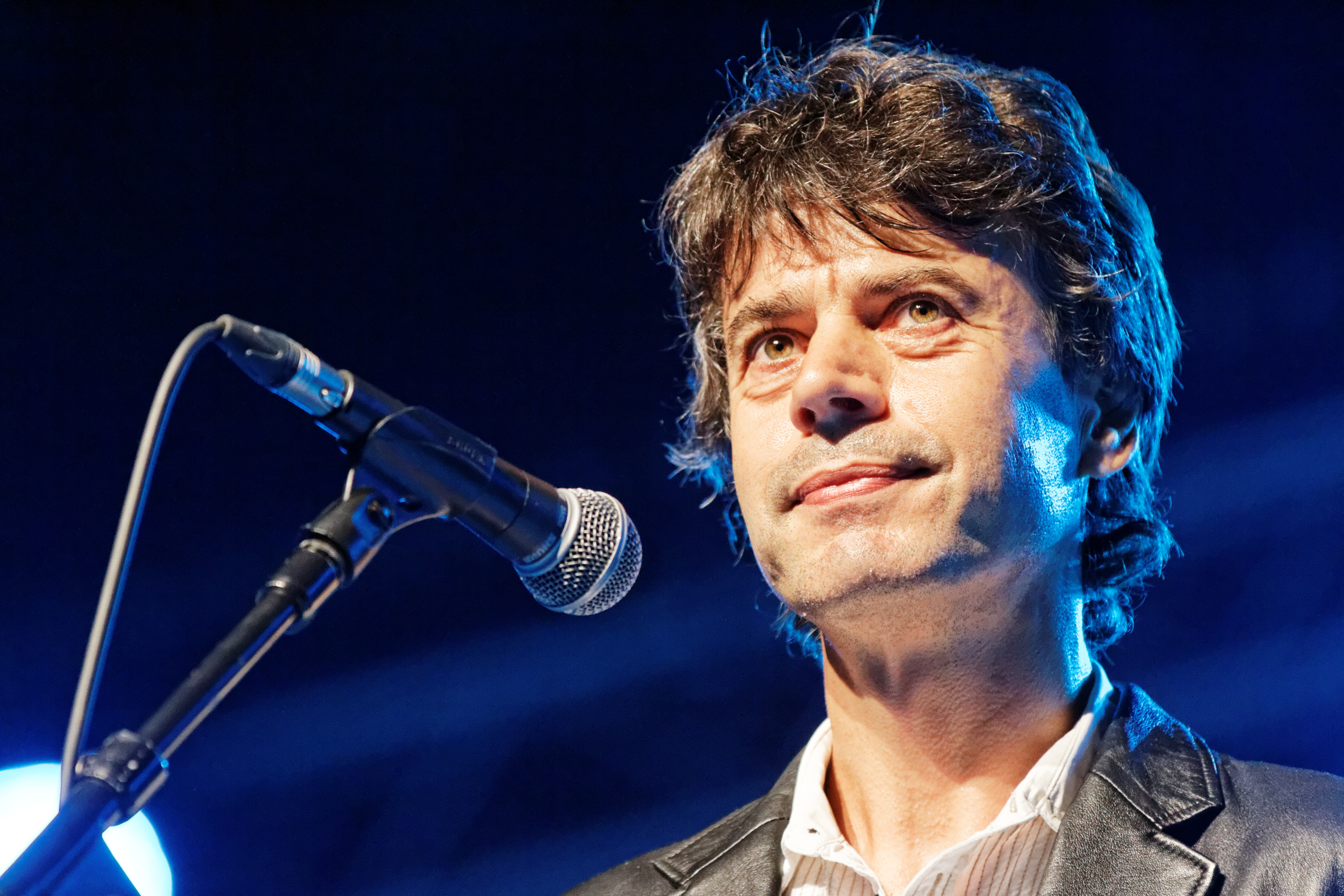 Denez Prigent en concert sur la scène Gradlon lors du festival de Cornouaille 2014.